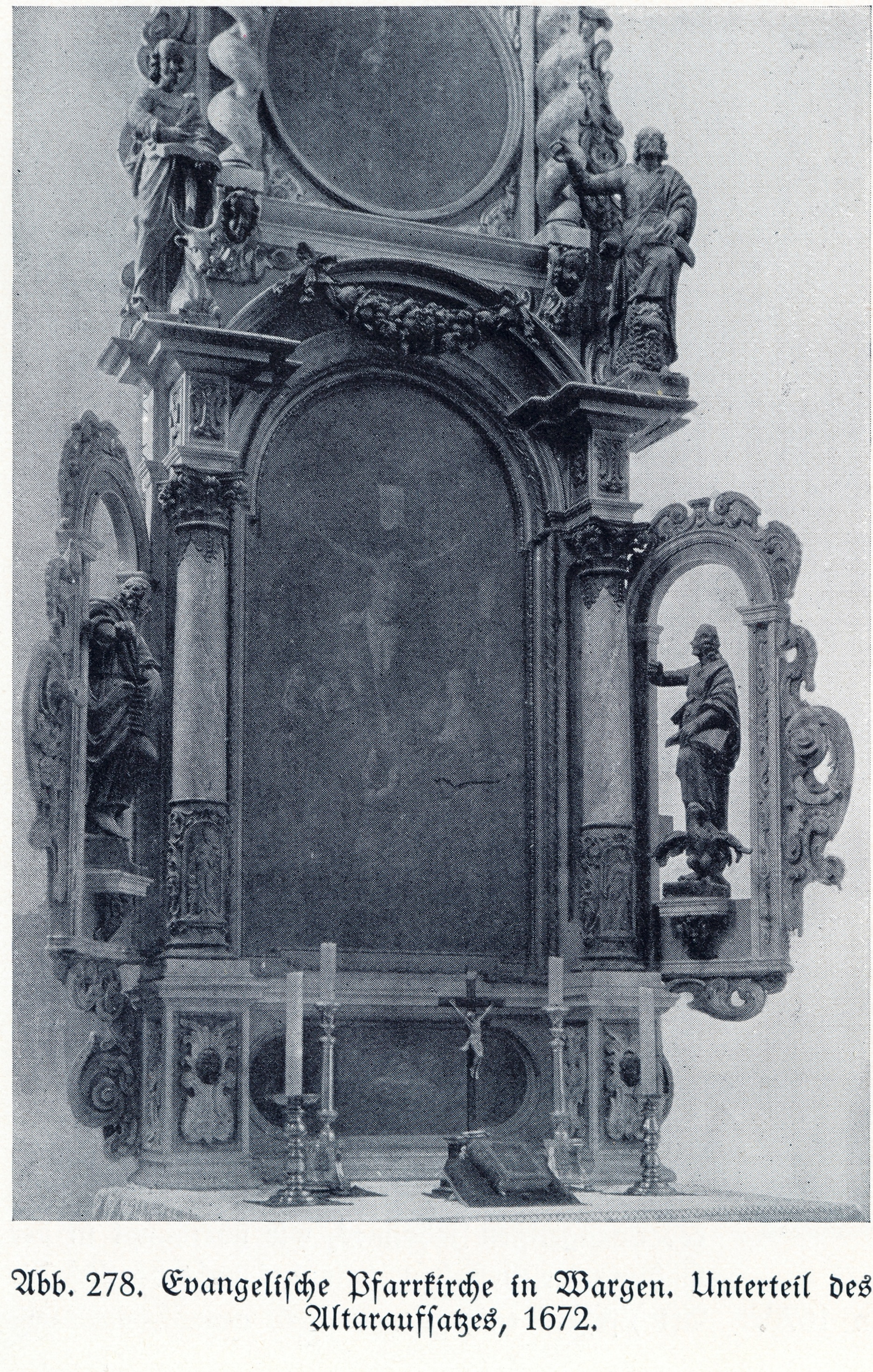 Wargen, Evangelische Pfarrkirche, Altaraufsatz, Unterteil, 1672, Bildhauer Joh. Pfeffer (zugeschrieben)